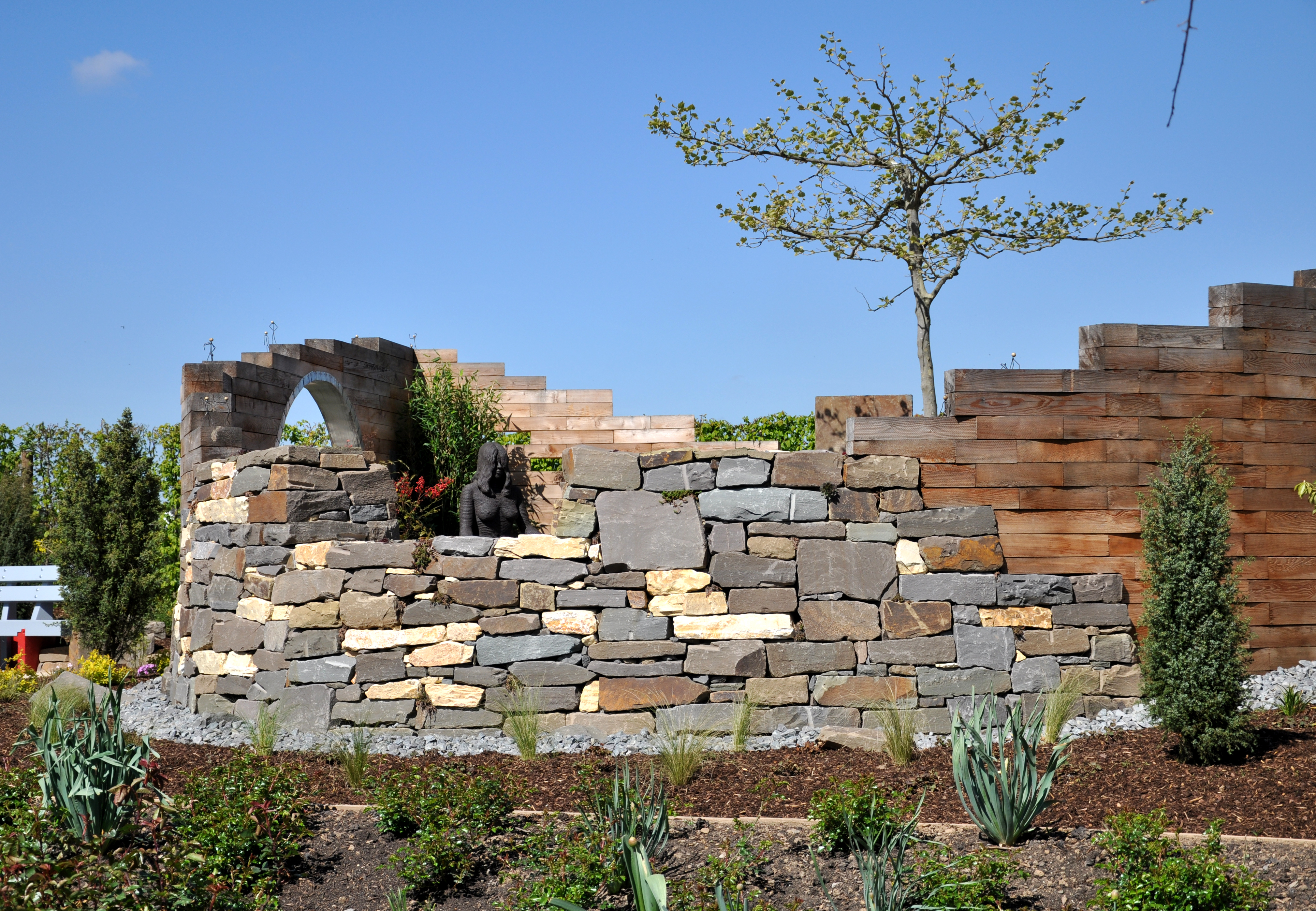 Landesgartenschau Zülpich 2014, Impressionen vom Eröffnungstag 16. April 2014